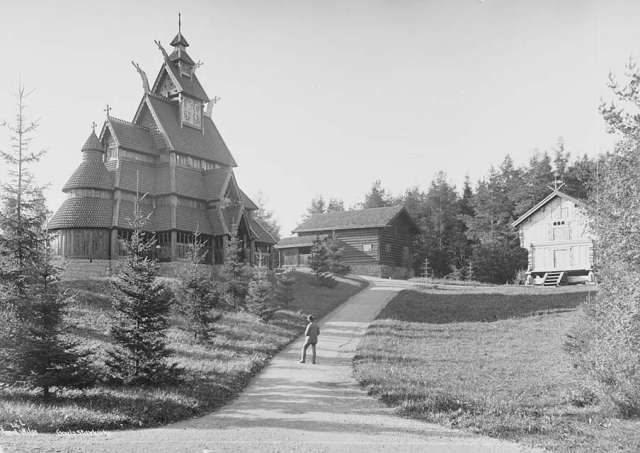 Gol stavkyrkje (Gol stave church, Norsk folkemuseum, Bygdøy, Oslo, Norway. Originally Gol, Buskerud fylke).